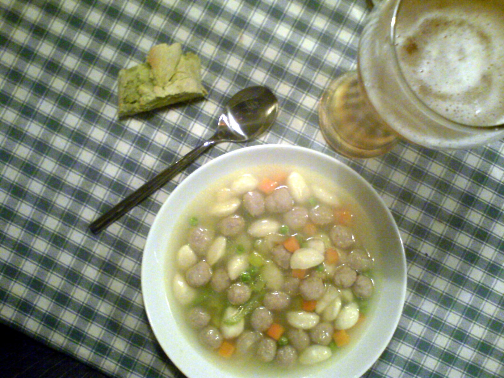 Oksekødsuppe med kød- og melboller med rucolabrød og hvedeøl